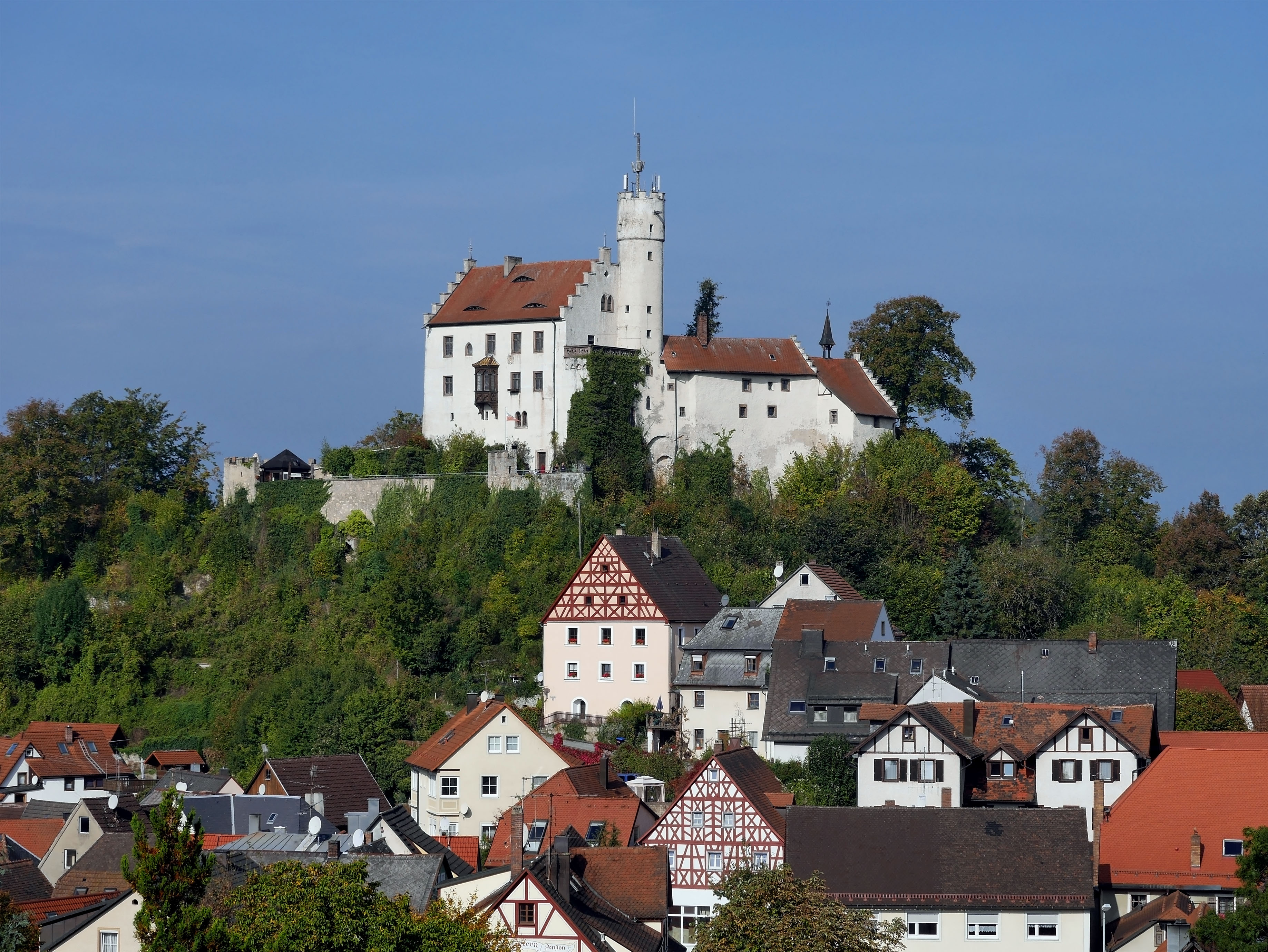 Burg Gößweinstein, eine mittelalterliche Burg in Gößweinstein in Bayern. Die Burg wurde 1076 erstmals urkundlich erwähnt. Im Bauernkrieg 1525 und dem Markgrafenkrieg 1553 kam es zu Zerstörungen und anschließenden Wiederaufbau. Von 1803 bis 1875 befand sie sich im bayerischen Staatsbesitz und wurde dann von Freiherr Edgar von Sohlern erworben und 1890 im neugotischen Stil umgestaltet.